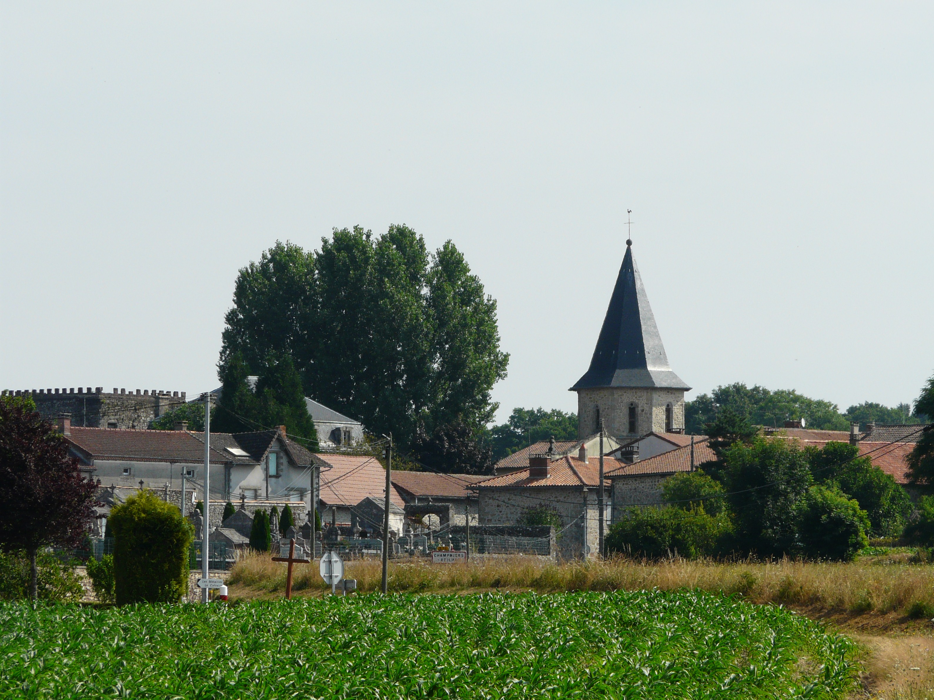 Le village de Champniers-et-Reilhac, Dordogne, France.